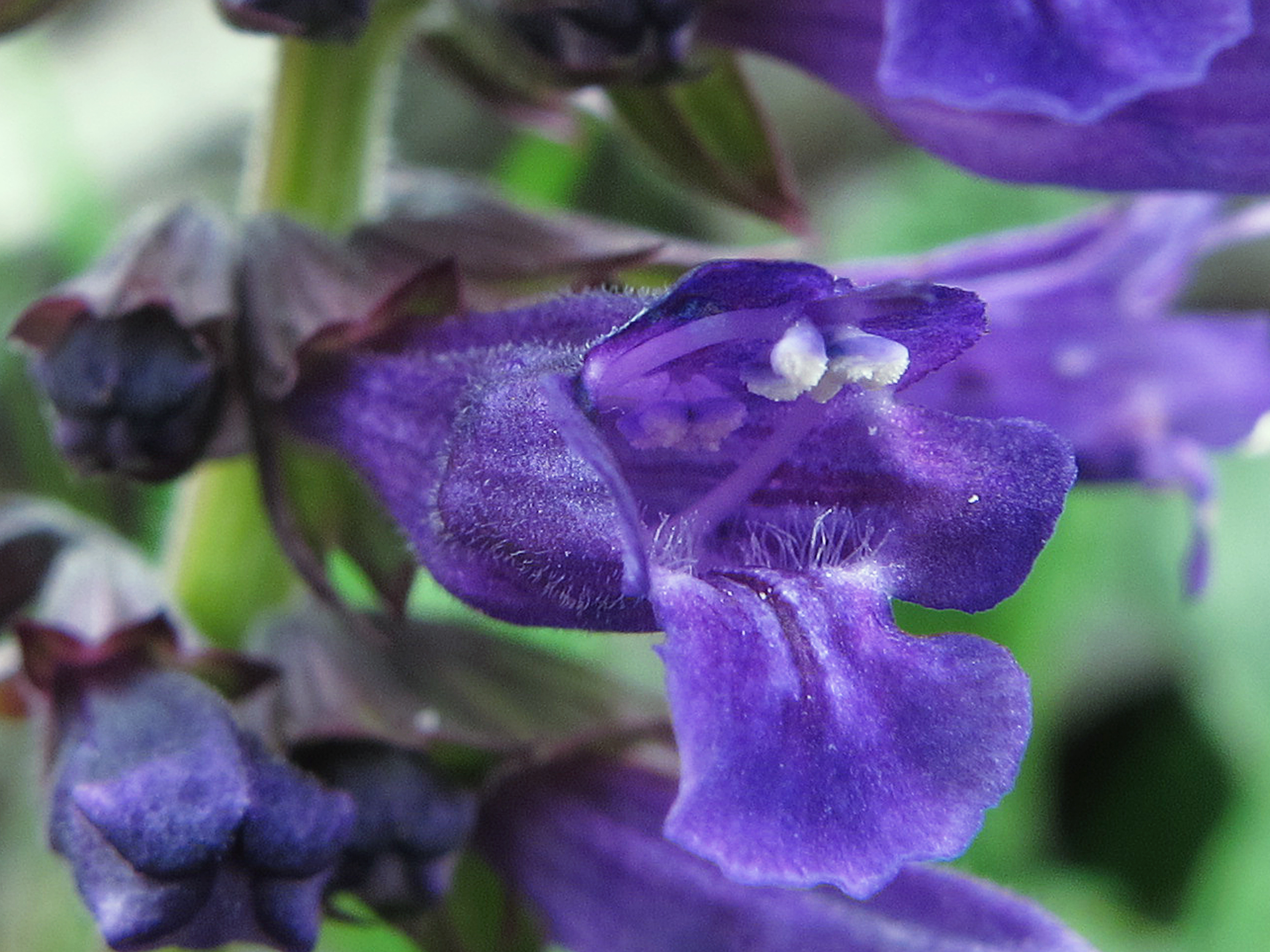 De la tribu de las "Mentheae", Horminum pyrenaicum , es la unica de la especie Horminum, y crece principalmente las laderas rocosas y praderas de los Alpes y Pirineos.